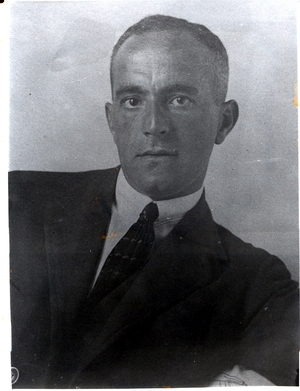 Fotografía de Luis Crespí Jaume